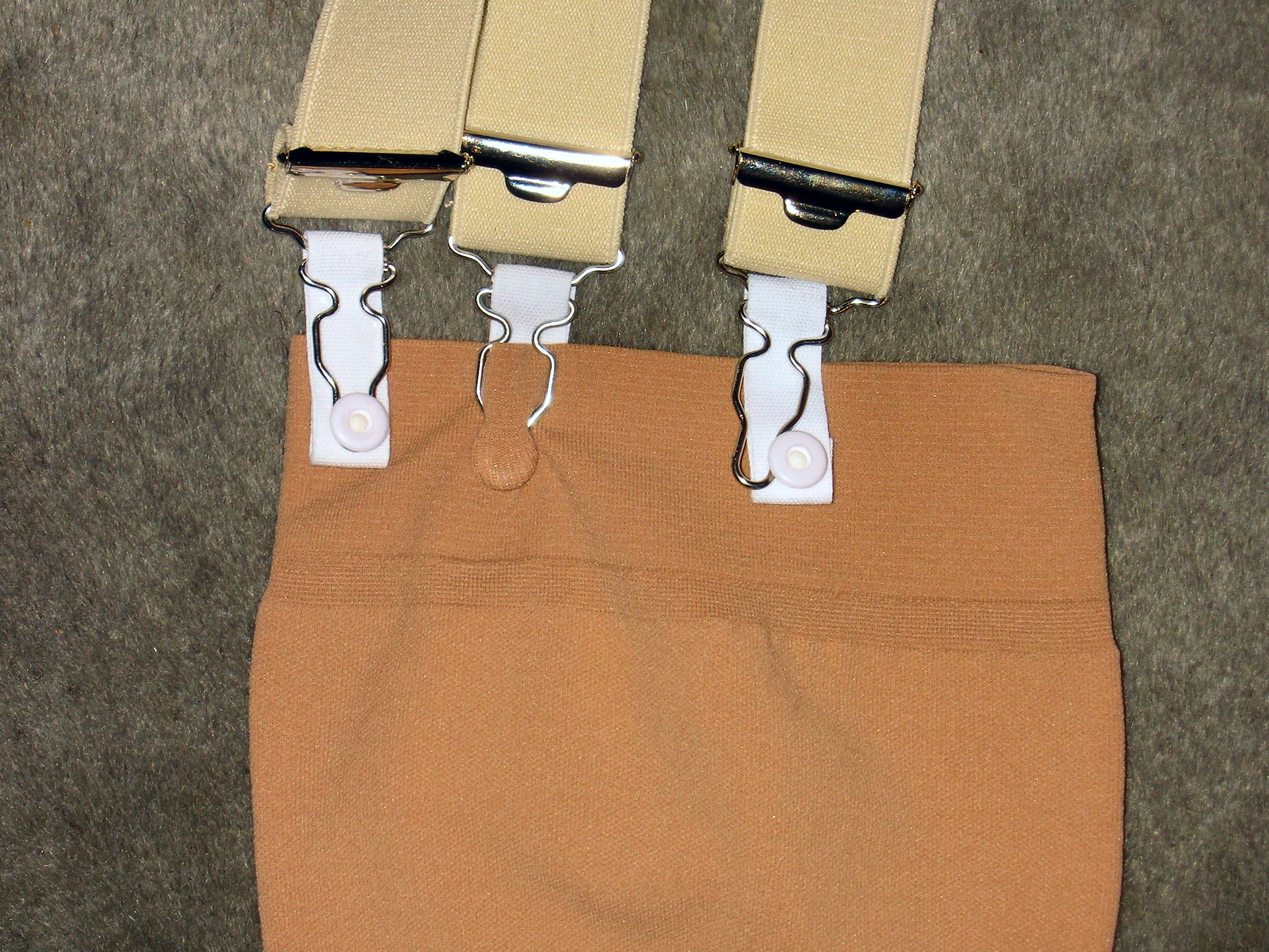 Strumpfhalterbefestigungsschnalle am Strumpf